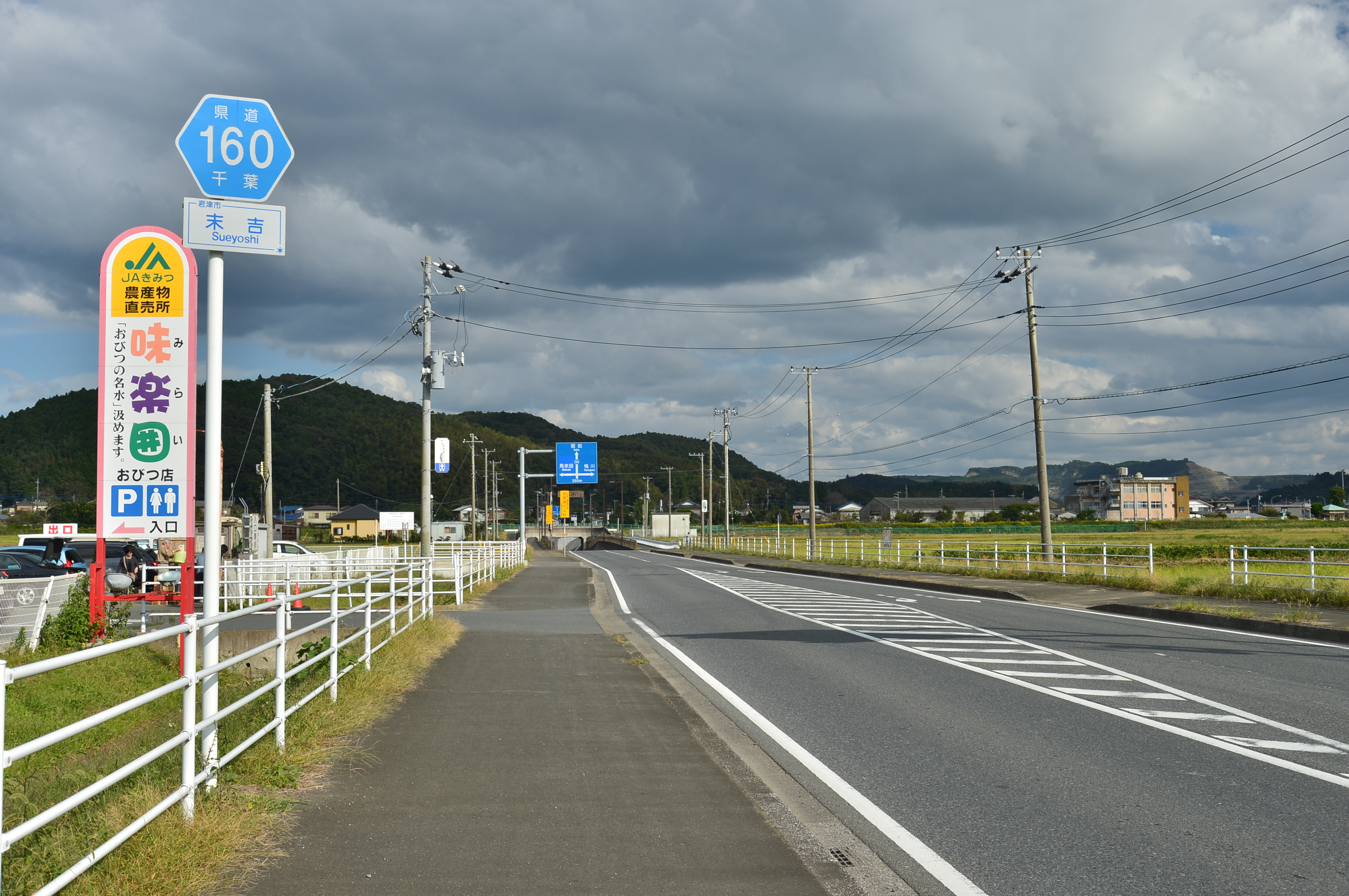 千葉県道160号加茂木更津線（君津市末吉）国道410号交点・末吉西交差点付近にて。写真の道路は、国道410号との重複区間となっている（2016年10月現在）。